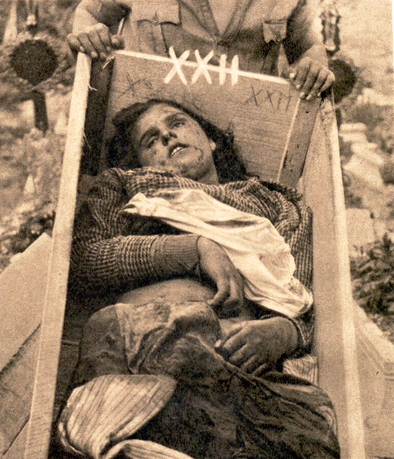 Žrtve Italijanov na planini Golobar nad Bovcem